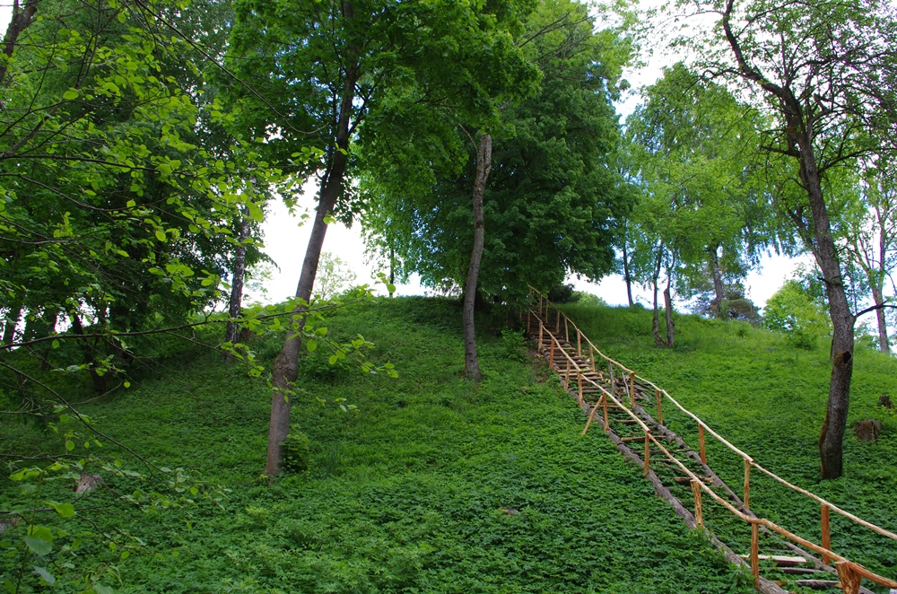 Stirniškių piliakalnis